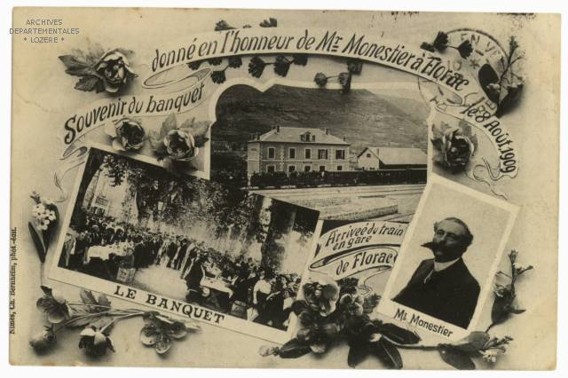 Carte postale éditée à l'occasion de l'inauguration de la ligne Florac - Sainte-Cécile-d'Andorge